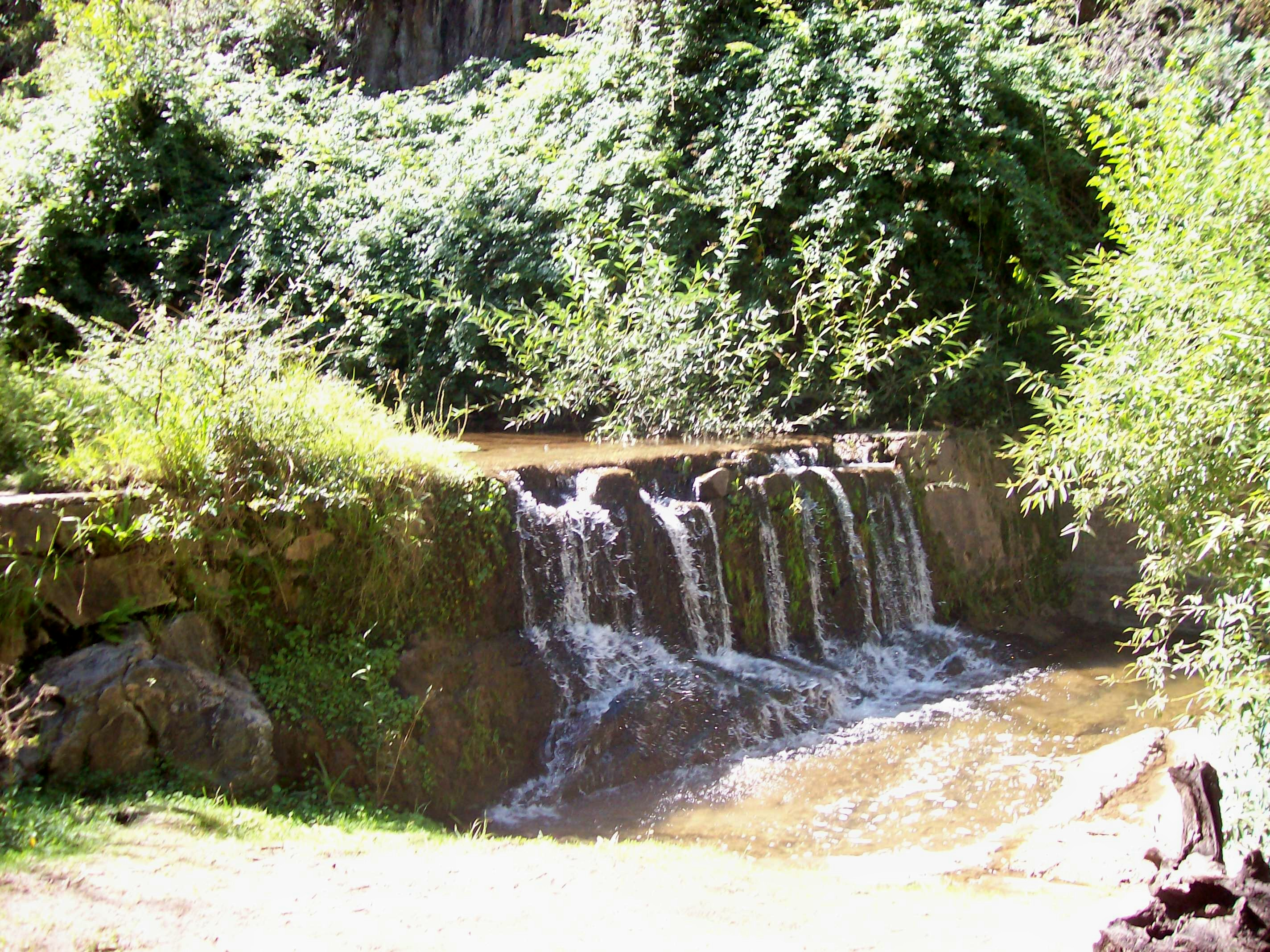 Diquecito del siglo XVIII en Vaquerías, Valle Hermoso, pcia. de Córdoba, Argentina. Las coordenadas dadas son aproximadas, con (estimo) no más de 300 m de error de la posición correcta